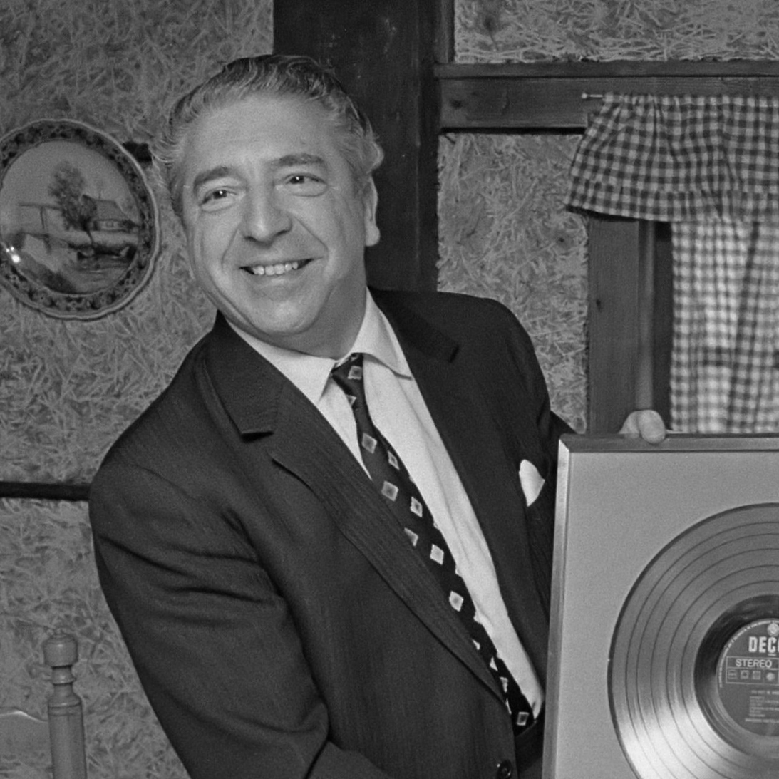 Mantovani ontvangt gouden plaat te Amstelveen. Mantovani met plaat 17 februari 1970